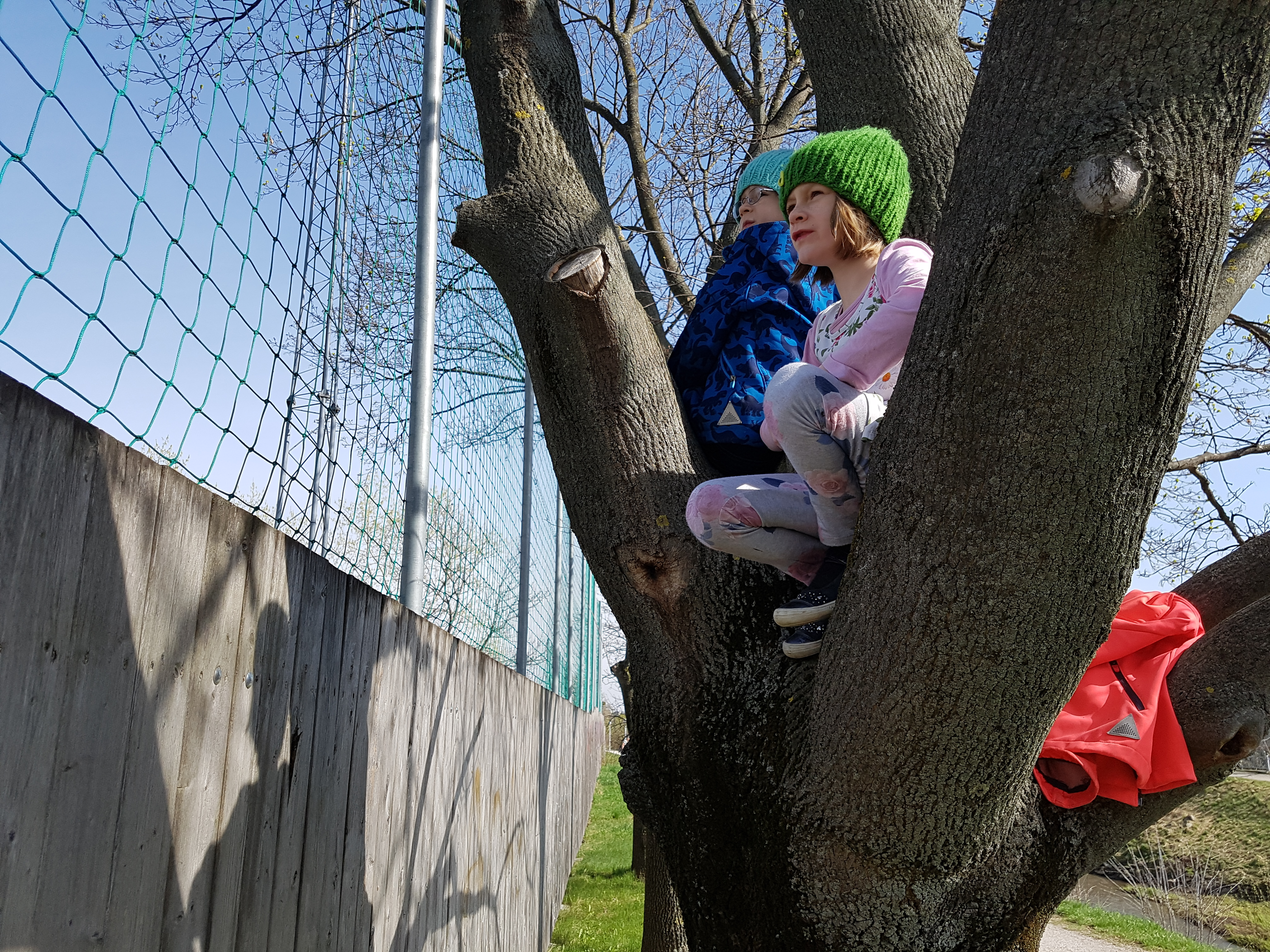 Zaungäste beim Fußball schauen. Die Persönlichkeitsrechte wurden zuvor erörtert.